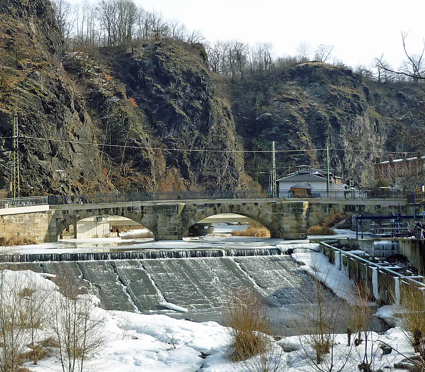 Hegereiterbrücke Tharandter Str. in Dresden-Plauen (bis 1927 für die Straße nach Freital)